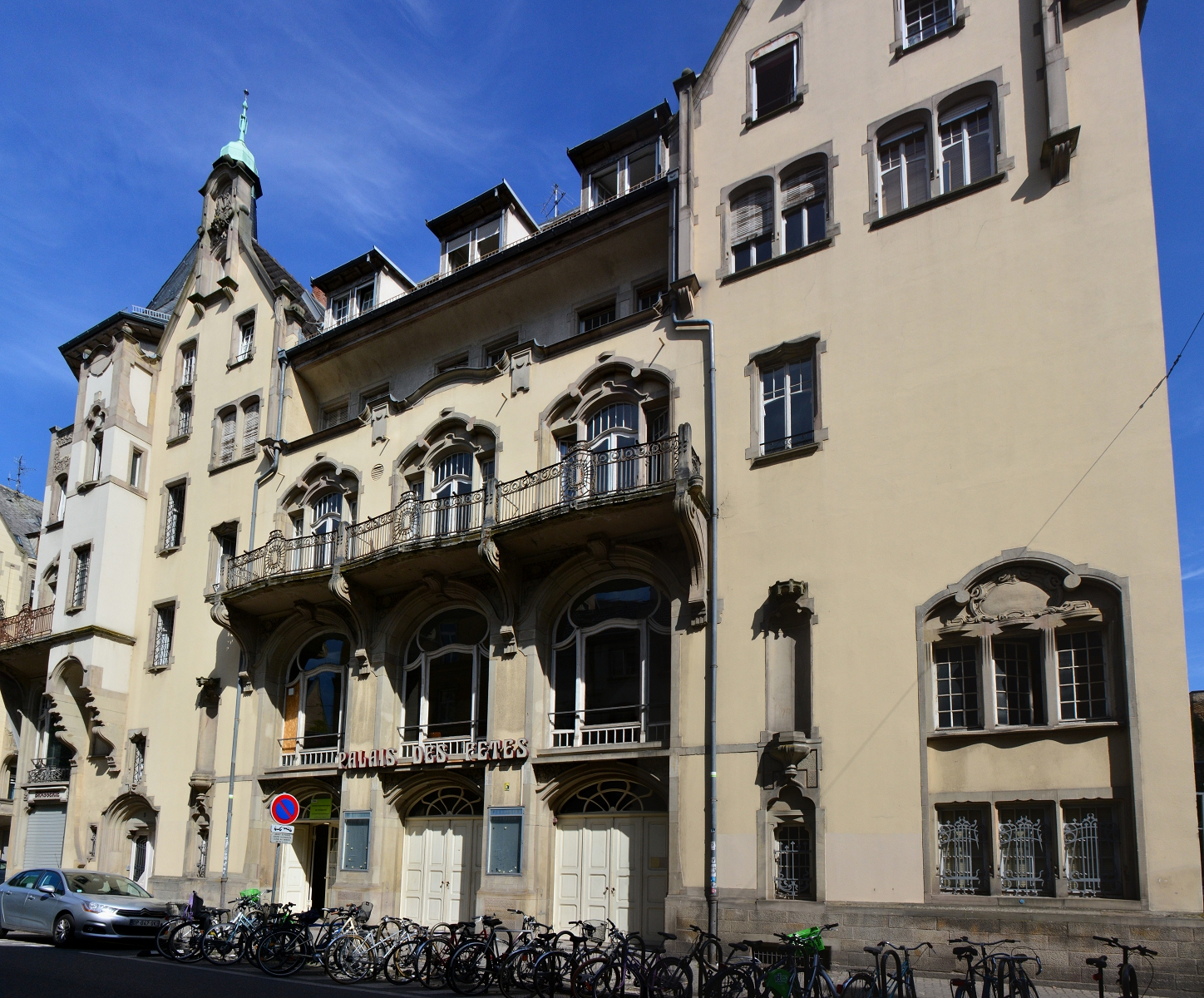 Sängerhaus Straßburg, Jugendstilfassade im unrestaurierten Zustand